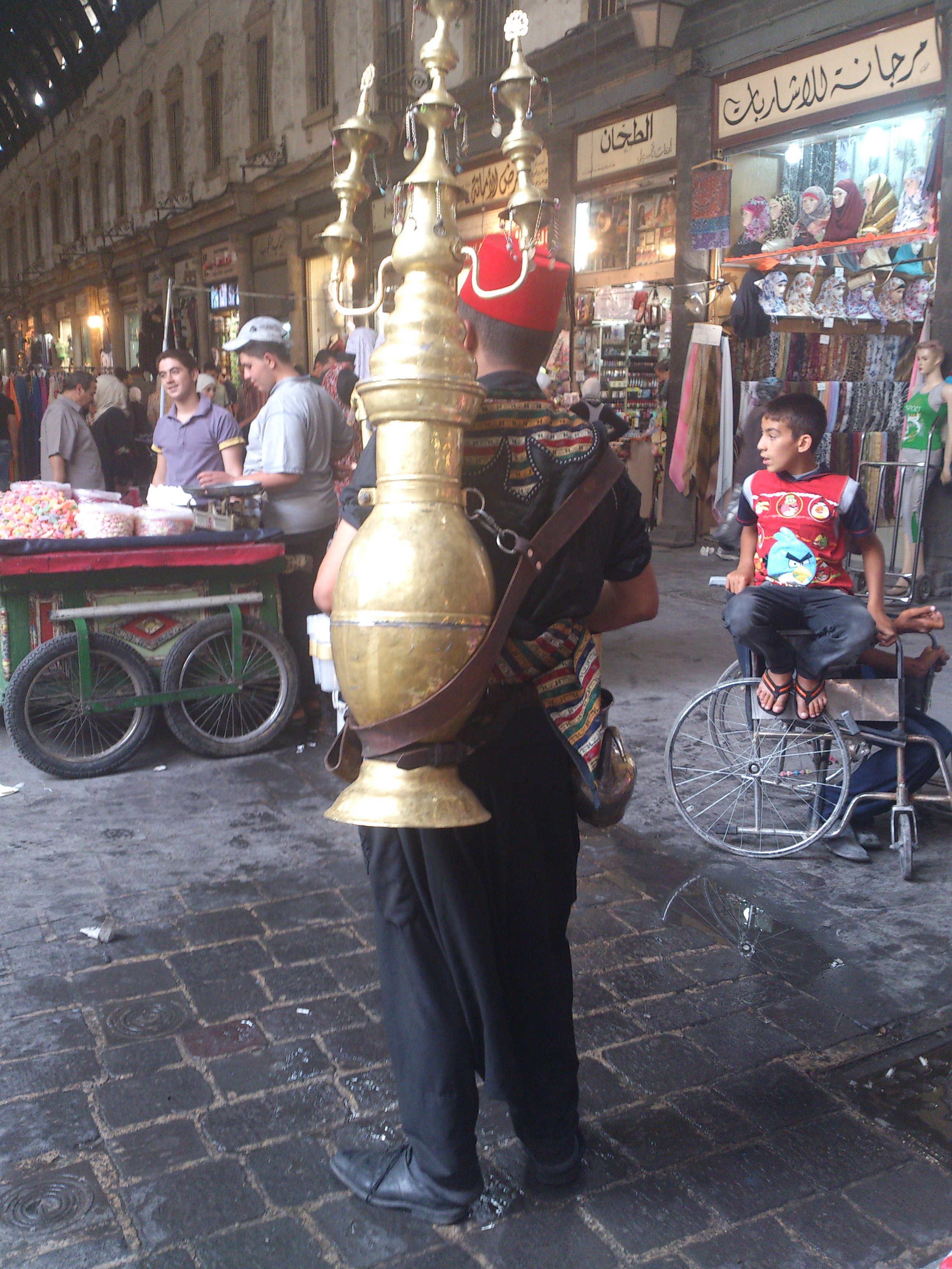 بائع التمر هندي بزيه الدمشقي التقليدي يقف في سوق الحميدية يقدم الشراب البارد للمتسوقين